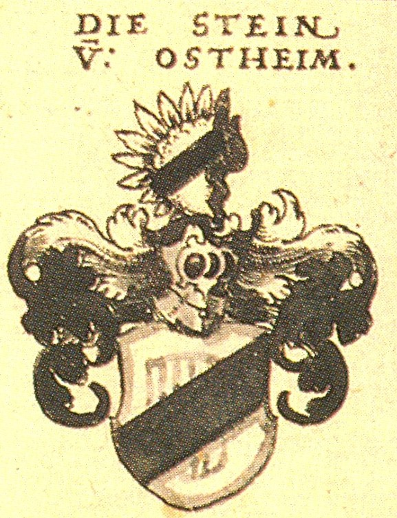 Wappen der Fränkischen Adelsfamilie Stein von Ostheim